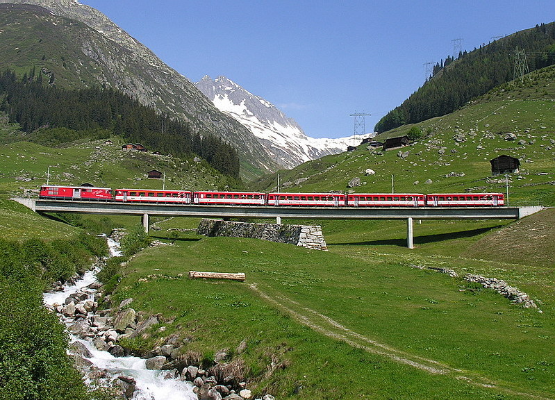 Deh44II_xx